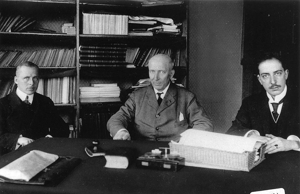 De oprichters van de Nederlandsche Handels-Hoogeschool, de havenbaronnen J.A. Ruys, C.A.P. van Stolk en mr. W.C. Mees (v.l.n.r.) Beeld: Erasmus Universiteit Rotterdam